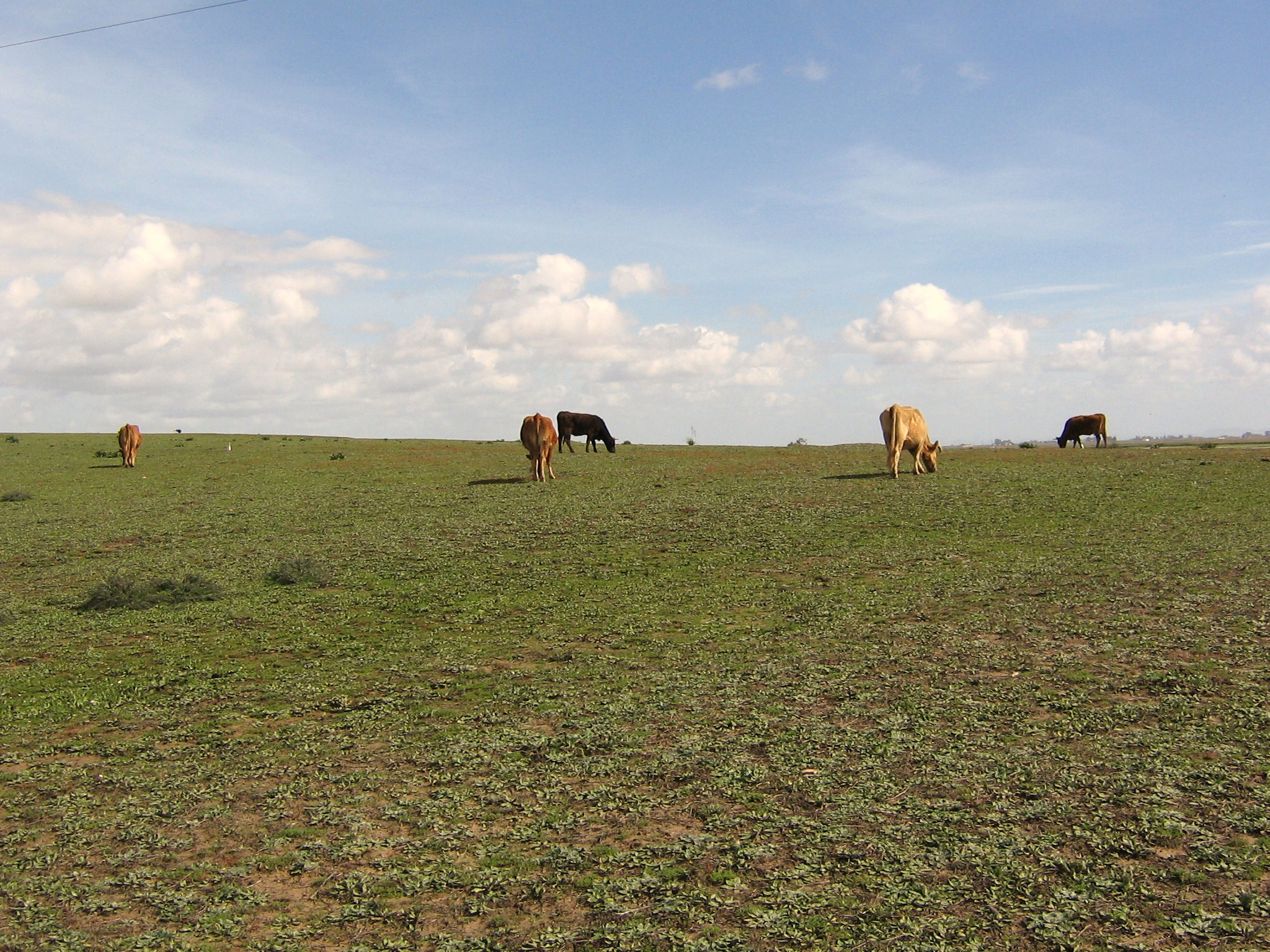 Bóvidos en semilibertad en La Dehesa de Abajo. La puebla del Río (Sevilla)